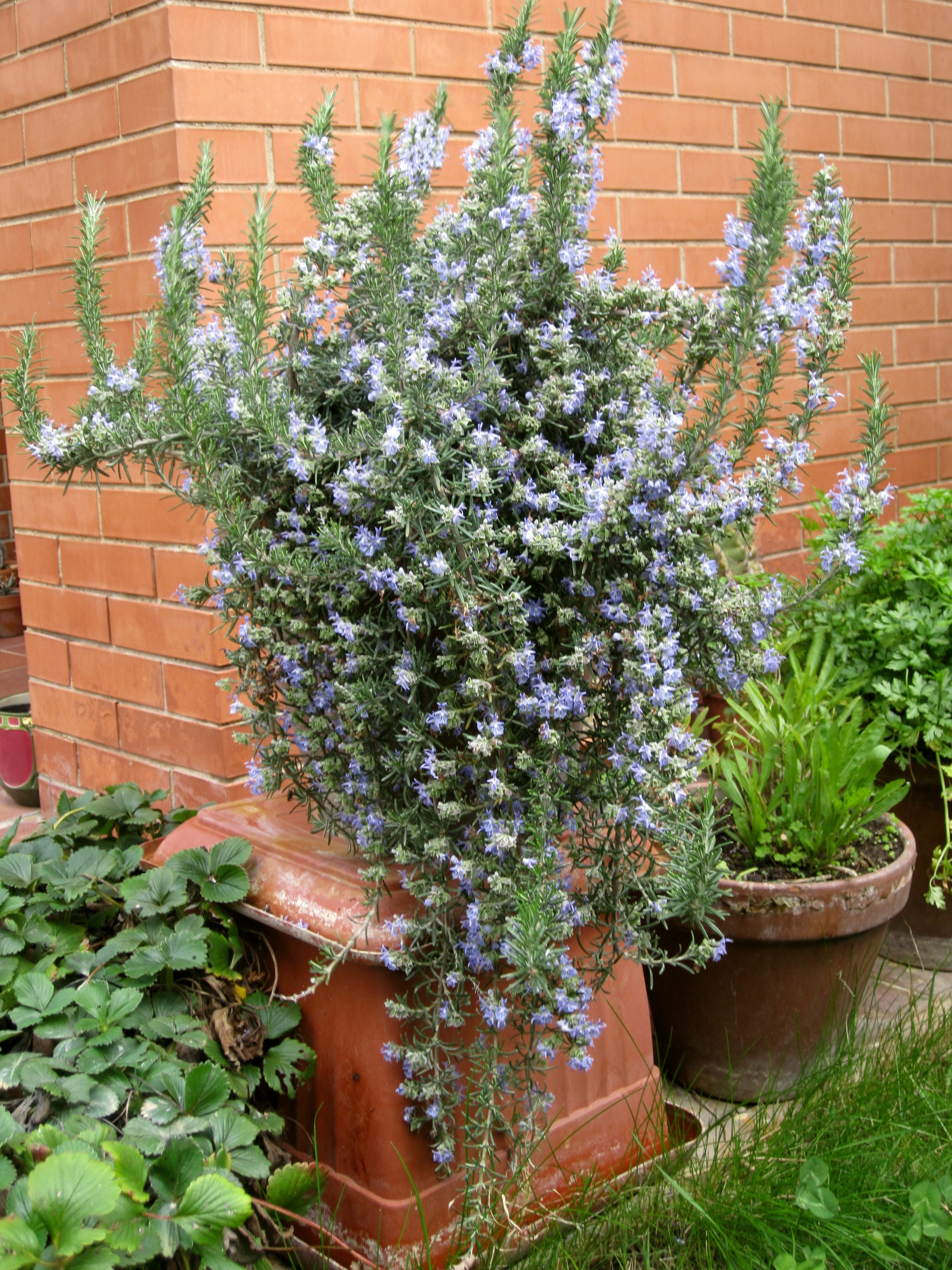 Una pianta di rosmarinus officinalis prostratus in fiore